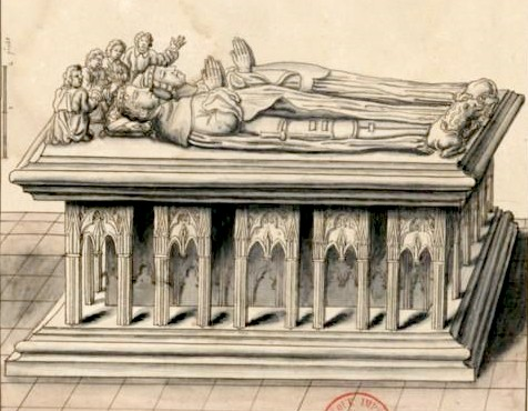 Charles I de Bourbon et Agnes de Burgogne, dessin pour Gaignières, conservé àla BNF, numérisé pour Gallica.